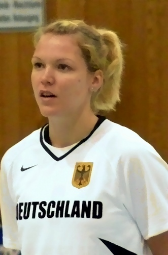 Dorothea Richter Basketballnationalspielerin